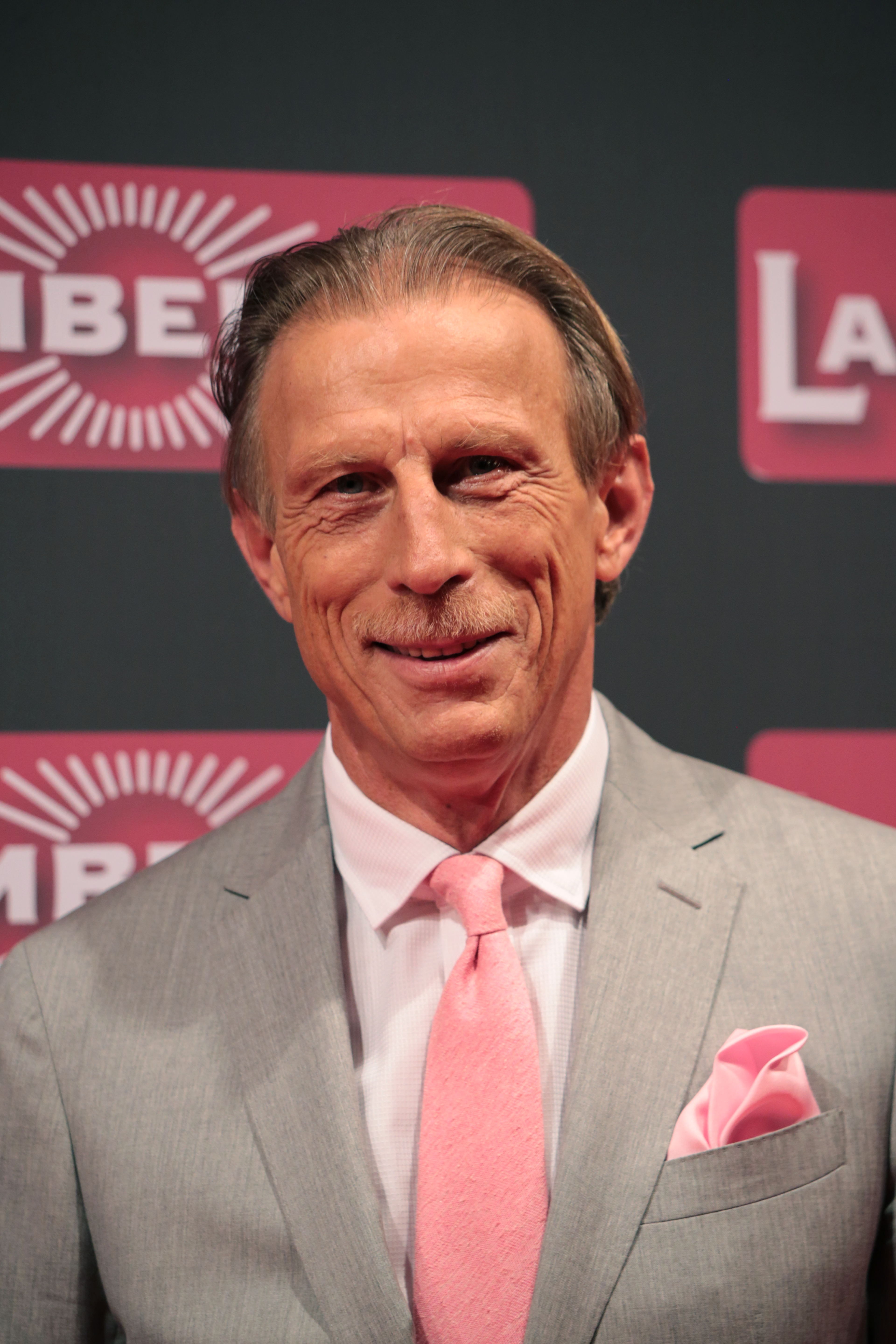 Christoph Daum bei der Lambertz Monday Night 2018.